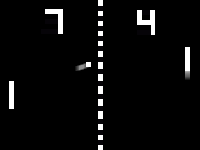 Illustration Bildschirm des Videospiels "Pong"